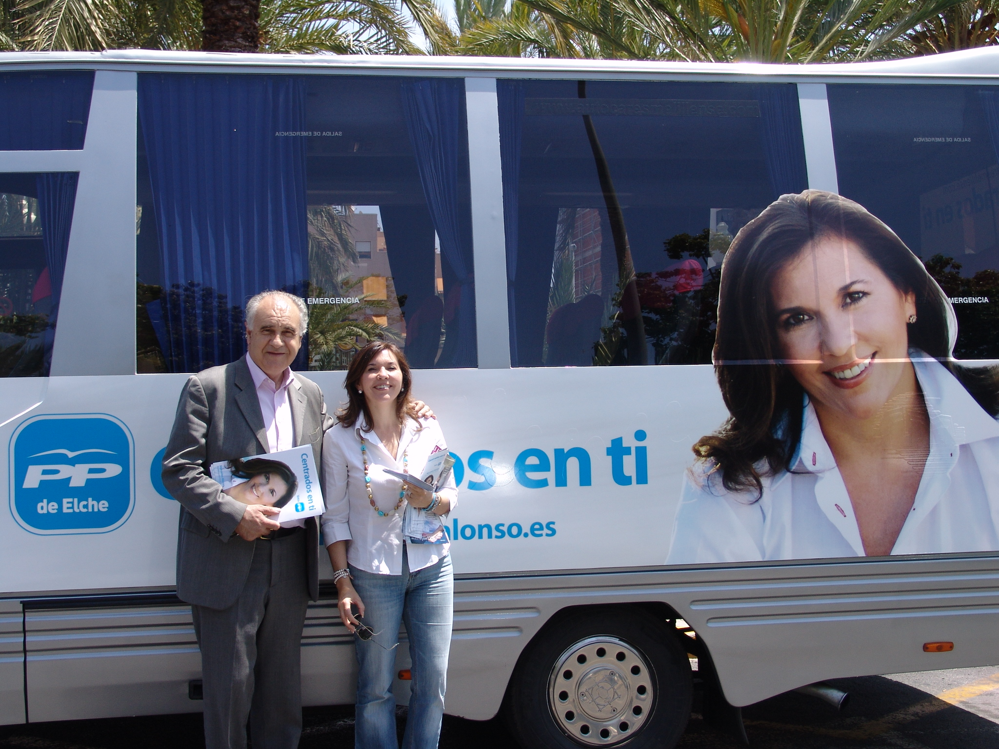 Rafael Blasco y la Alcaldesa de Elche